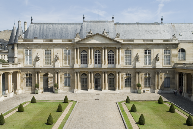 Vue générale de l'hôtel de Soubise qui accueille les Archives nationales depuis 1808. Il se visite et abrite depuis 1867 le Musée de l'Histoire de France dépendant des Archives nationales. Il sert de lieu d'exposition, de concert, de colloques ou de journées d'études.